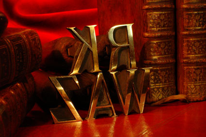 Détails d'un alphabet en Fers à Dorer.